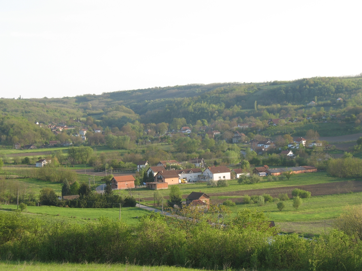 View on Senaja in Mladenovac municipality, near Belgrade, Serbia.